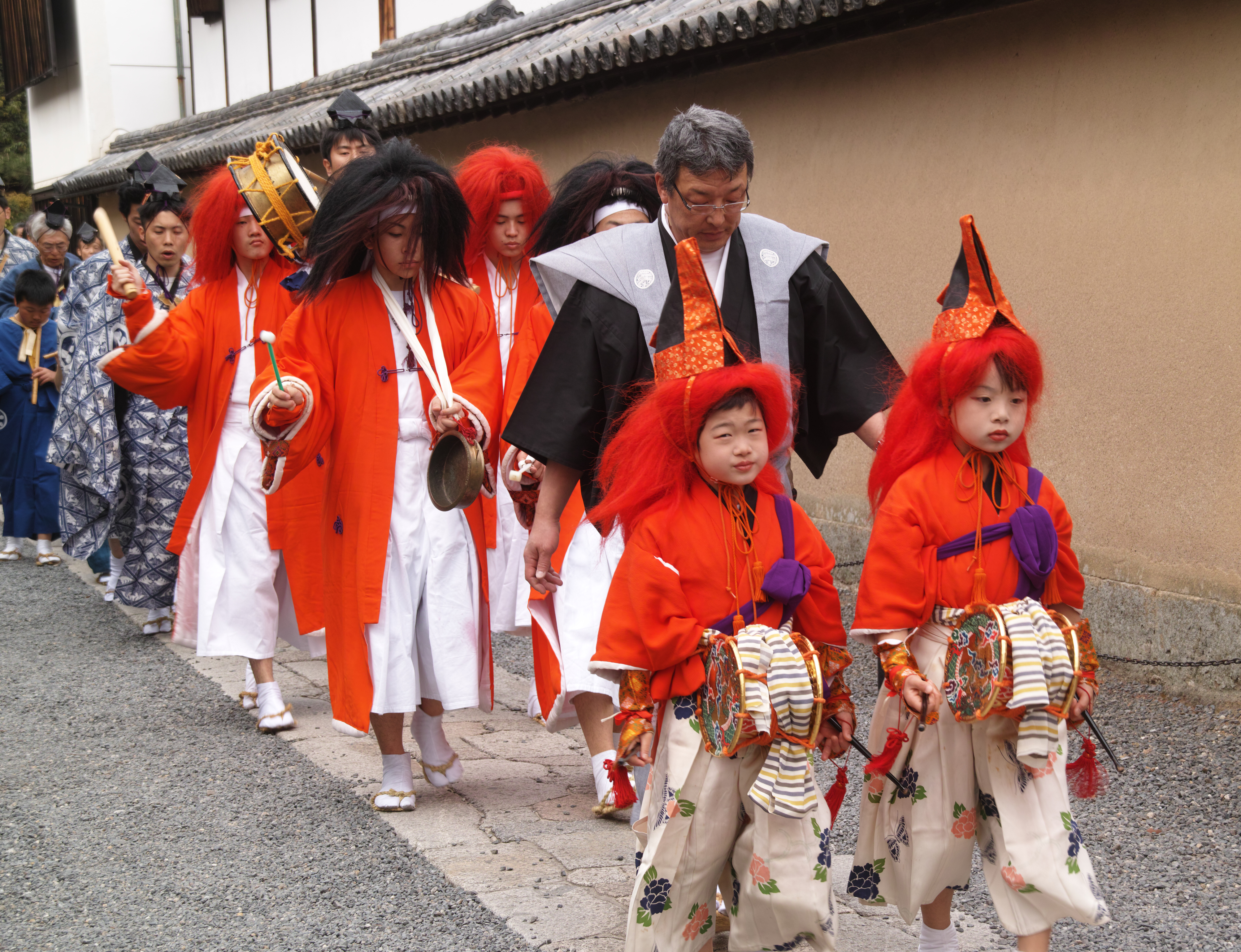 Imamiya Yasurai Matsuri: Zug der Oni durch den Daitokuji Tempel, Kyoto